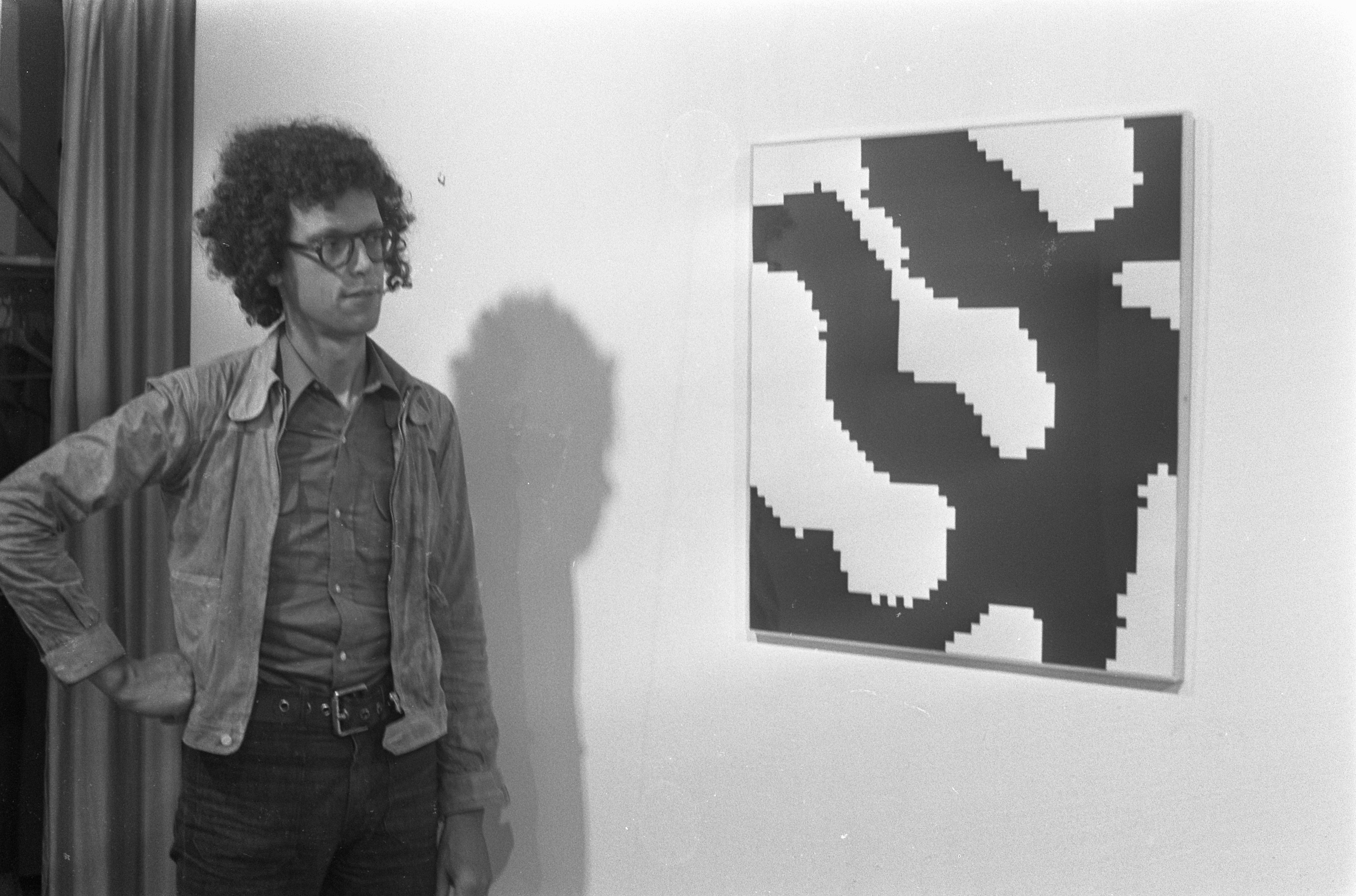 Collectie / Archief : Fotocollectie Anefo Reportage / Serie : [ onbekend ] Beschrijving : Opdracht Philips Persbureau bij Galerie Swart Datum : 4 augustus 1972 Instellingsnaam : Philips Fotograaf : Peters, Hans / Anefo Auteursrechthebbende : Nationaal Archief Materiaalsoort : Negatief (zwart/wit) Nummer archiefinventaris : bekijk toegang 2.24.01.05 Bestanddeelnummer : 925-7874